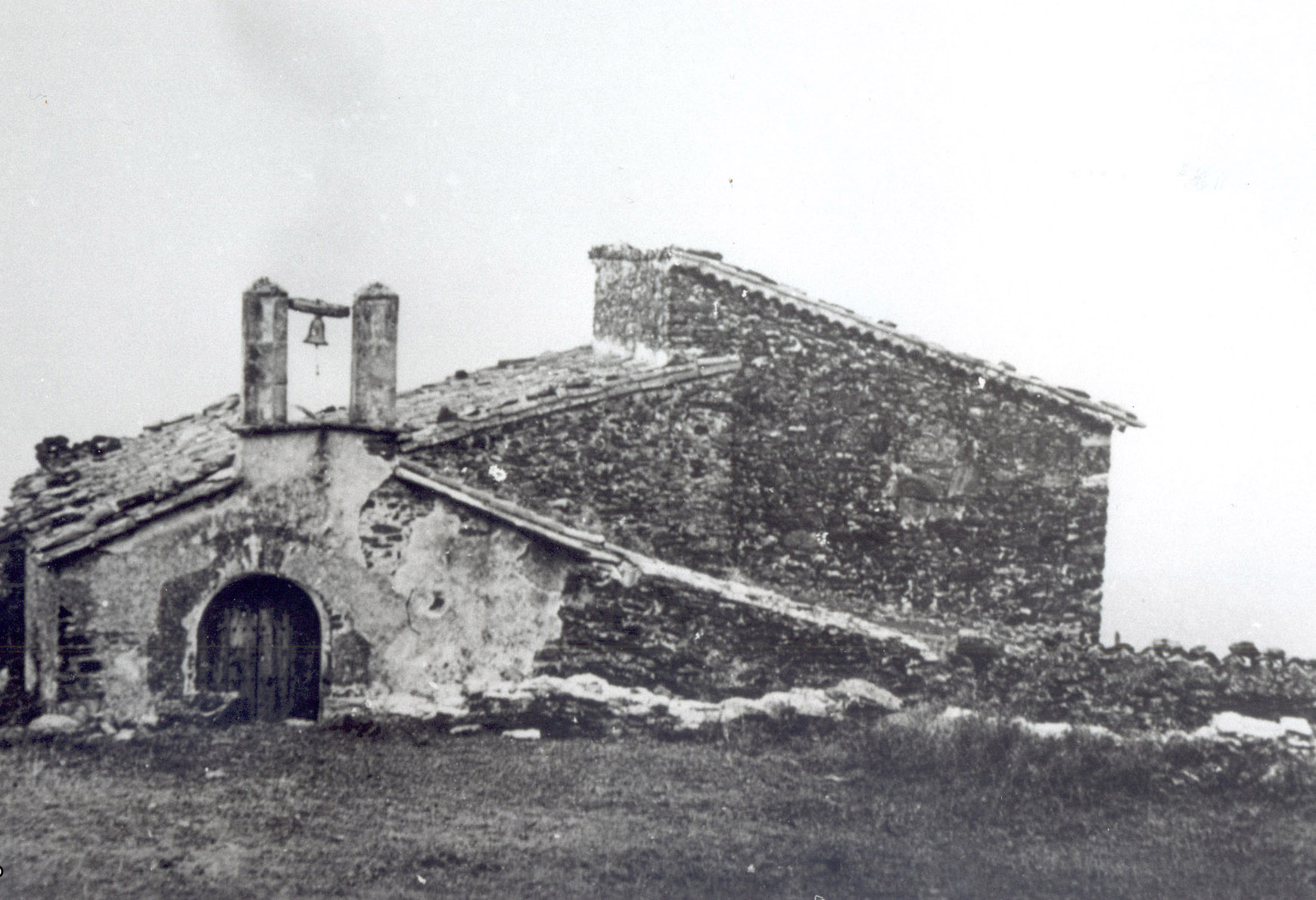 Capella de Sant Joan de Cavallar